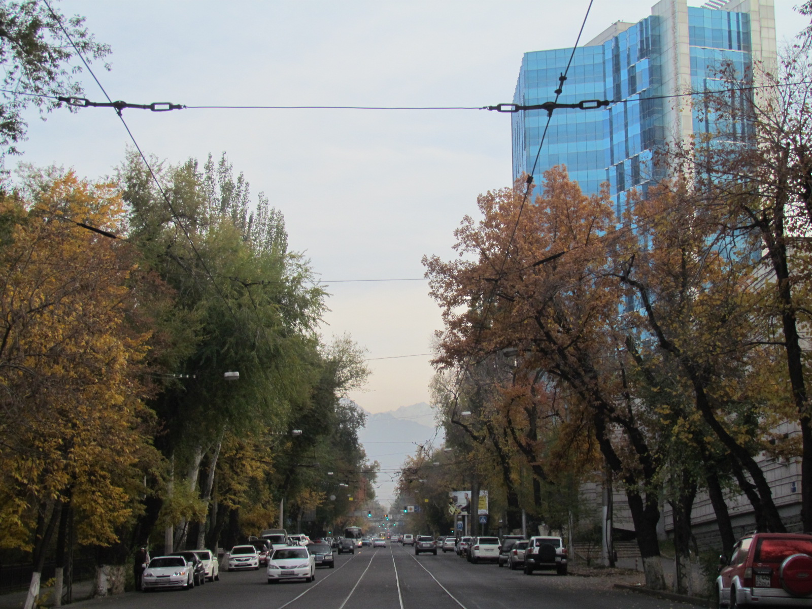 Перекресток улиц Кунаева-Гоголя (Алма-Ата, Казахстан), вид в направлении на юг вдоль улицы Кунаева. 19 октября 2014 года